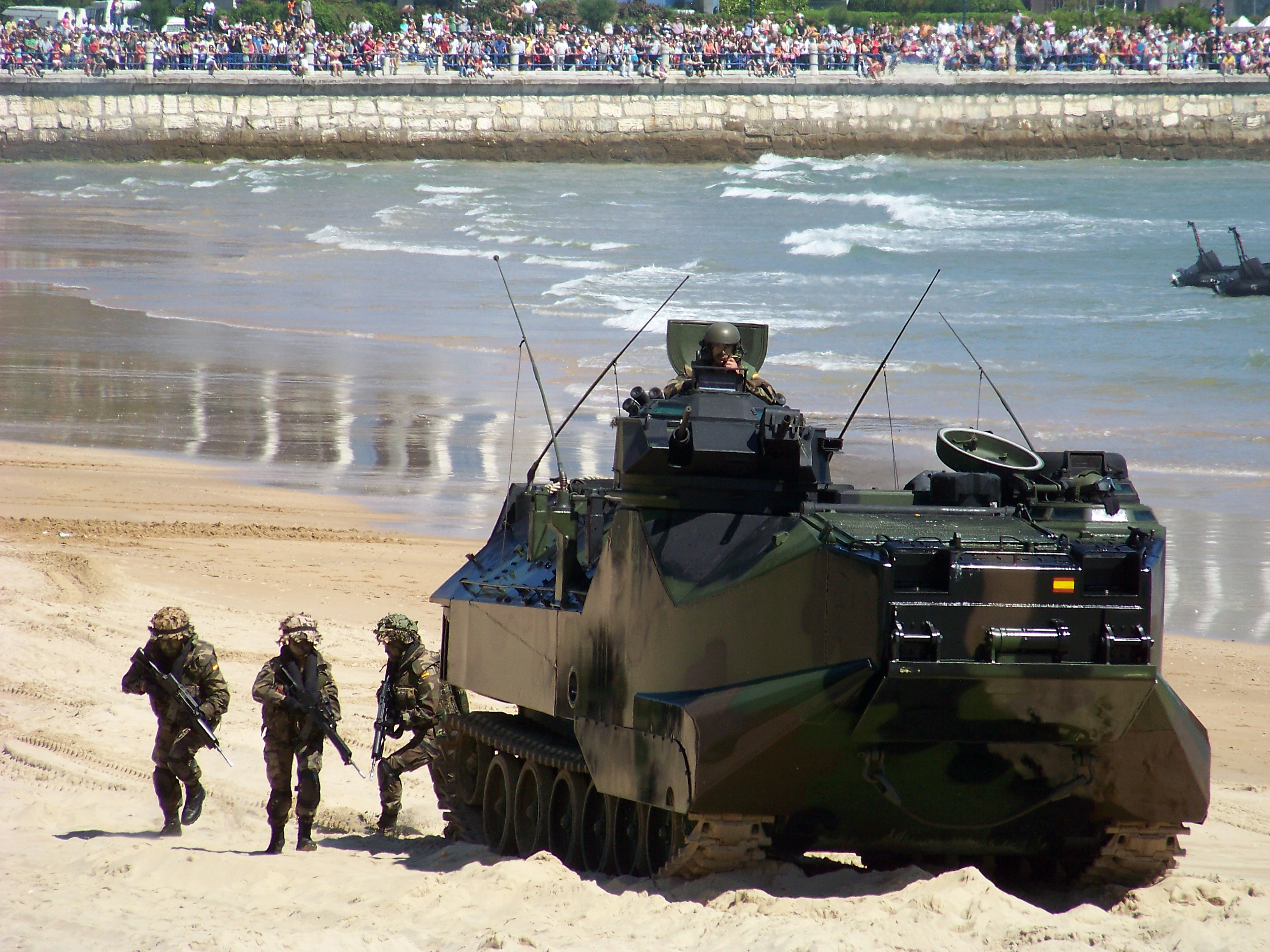 Infanteria de marina desplegandose desde un AAV-7 durante la Exhibicion en la playa del Sardinero en Santander el dia de las Fuerzas Armadas 2009